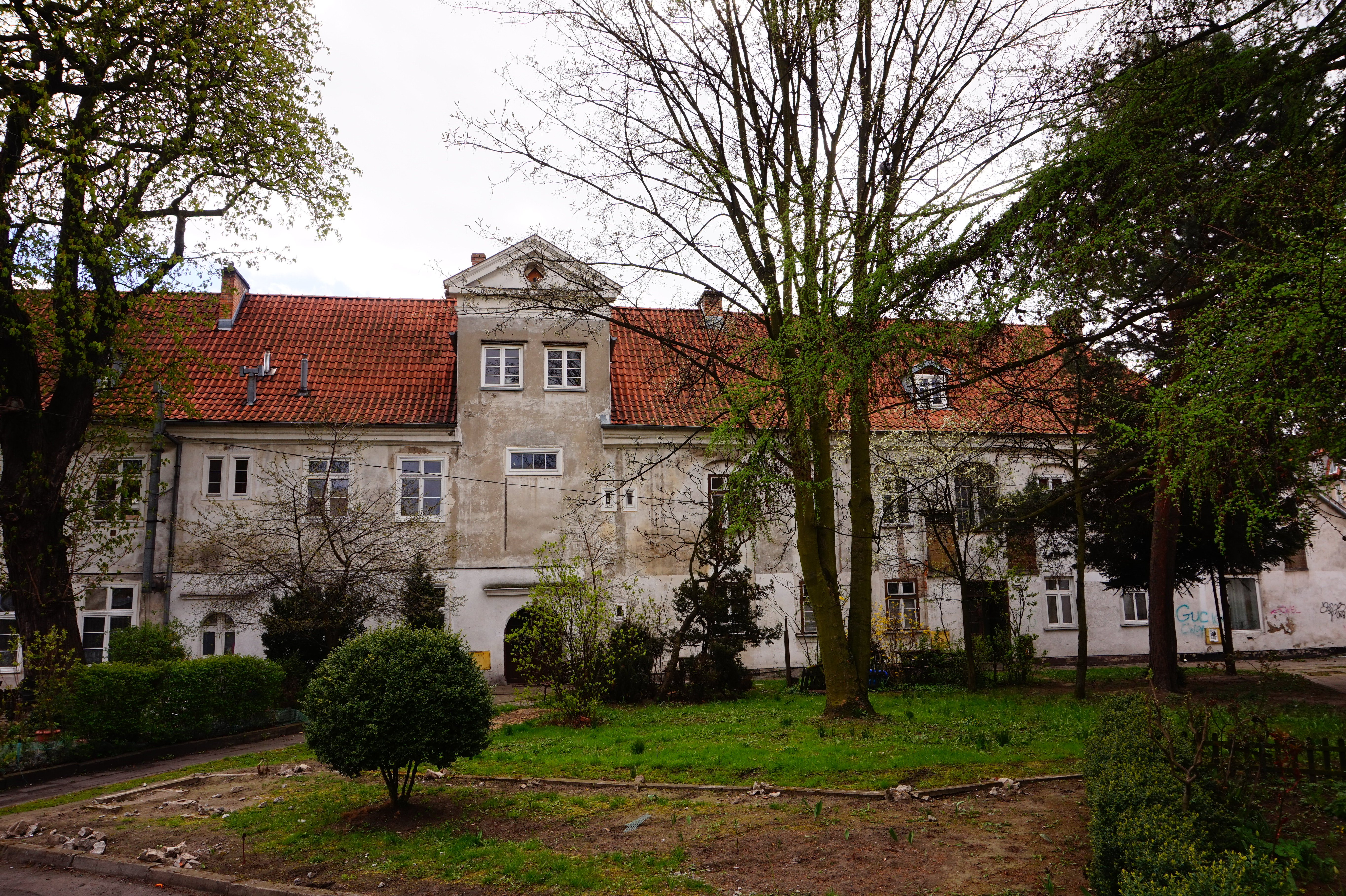 Gdańsk. Ulica Sieroca. Były Dom Dobroczynności